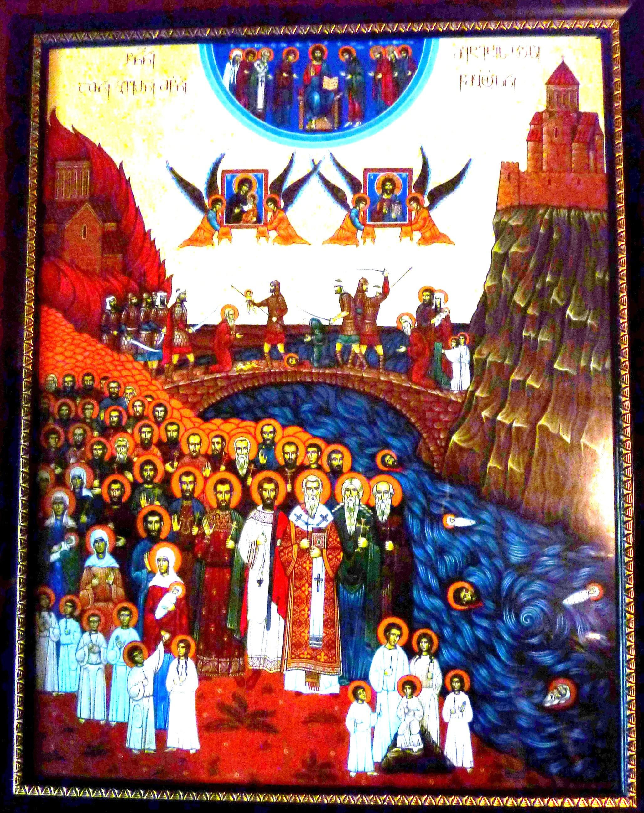 Tableau représentant l'invasion de Gengis Khan et les chrétiens jetés dans le fleuve Koura car ins refusaient d'abjurer leur religion